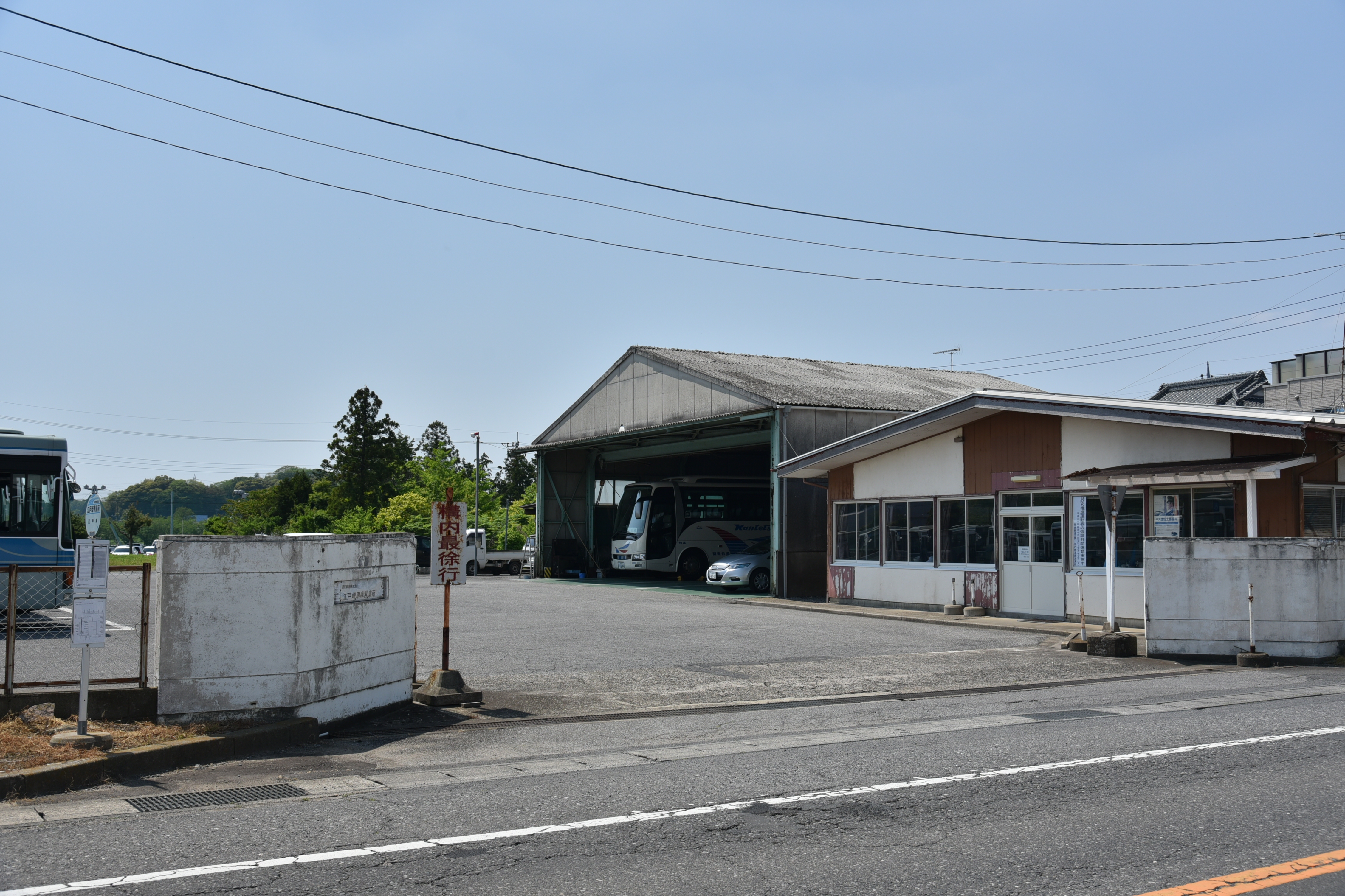 関東鉄道江戸崎車庫